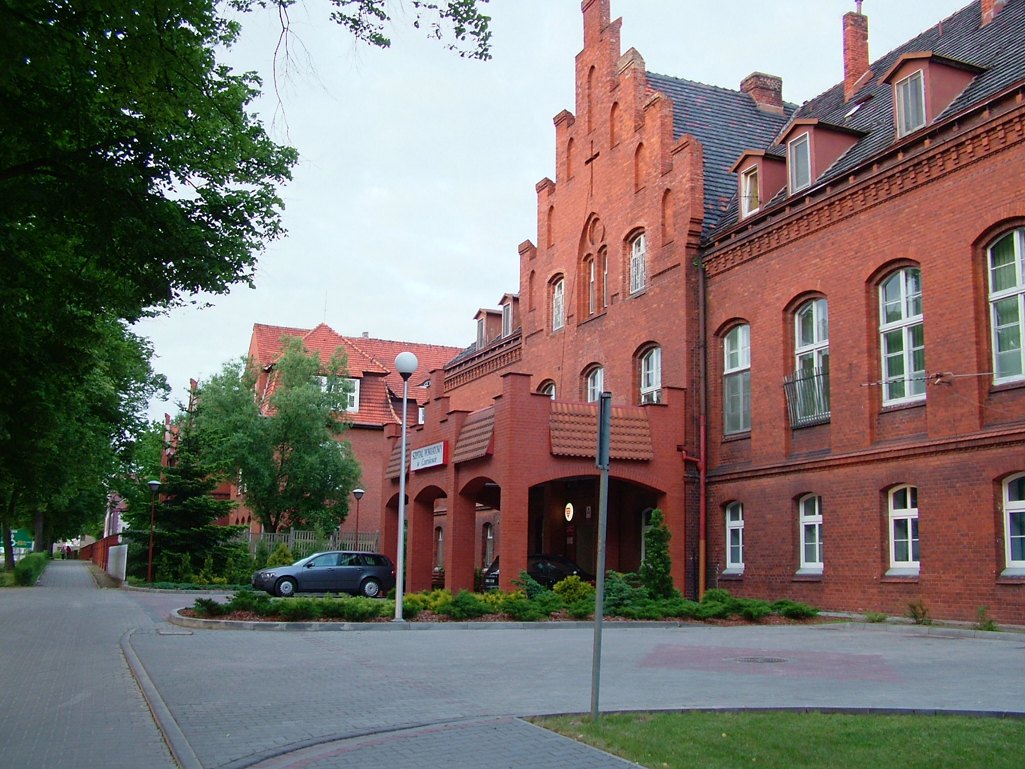 Szpital w Czarnkowie.